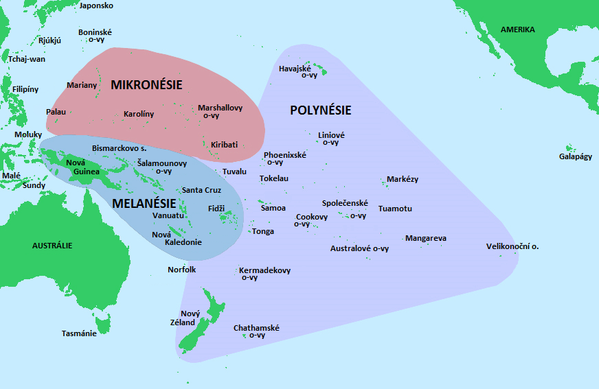 Hlavní kulturní oblasti Oceánie: Mikronésie, Melanésie a Polynésie.